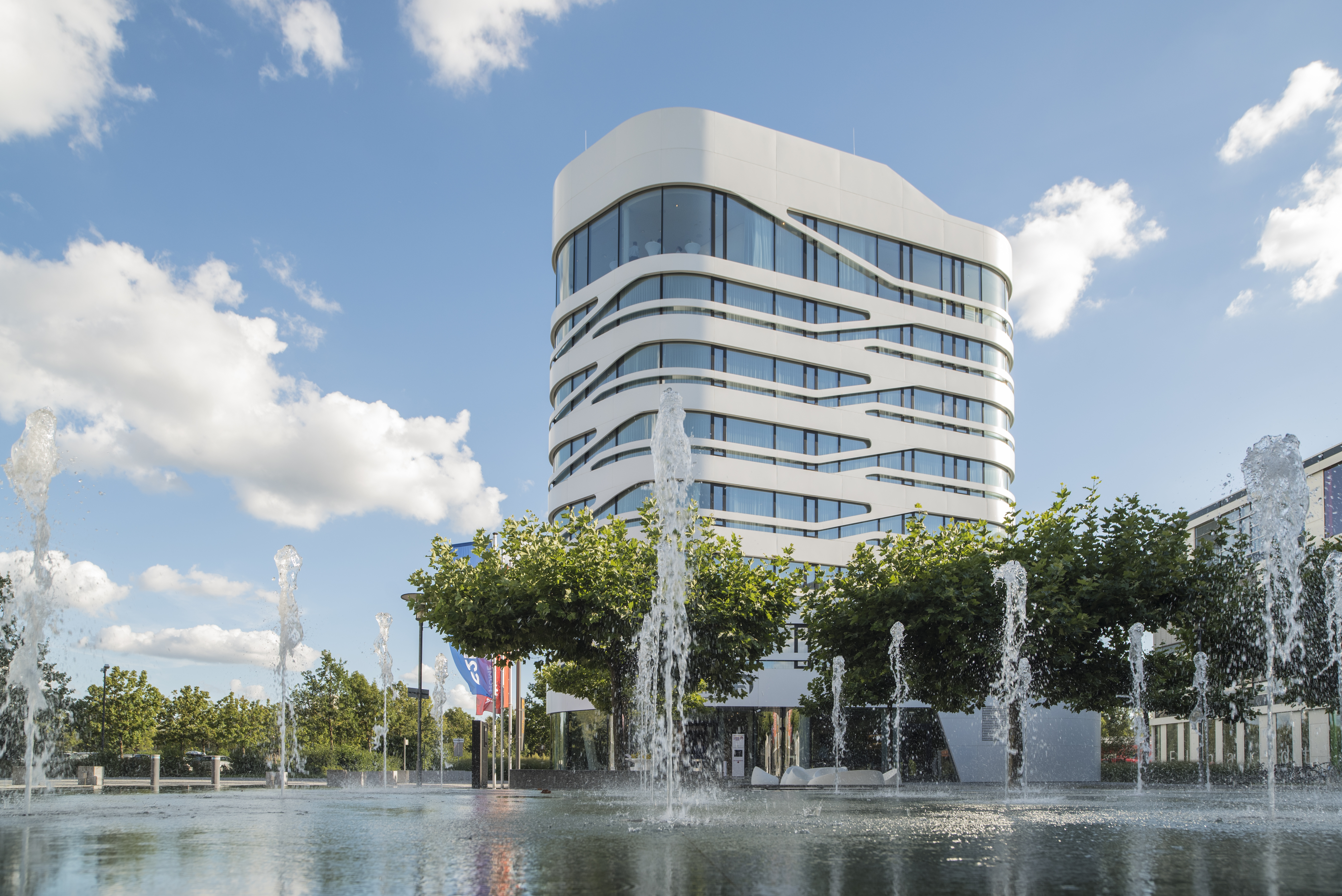 Die im Oktober 2014 eröffnete IZB Residence CAMPUS AT HOME auf dem Gelände des IZBs